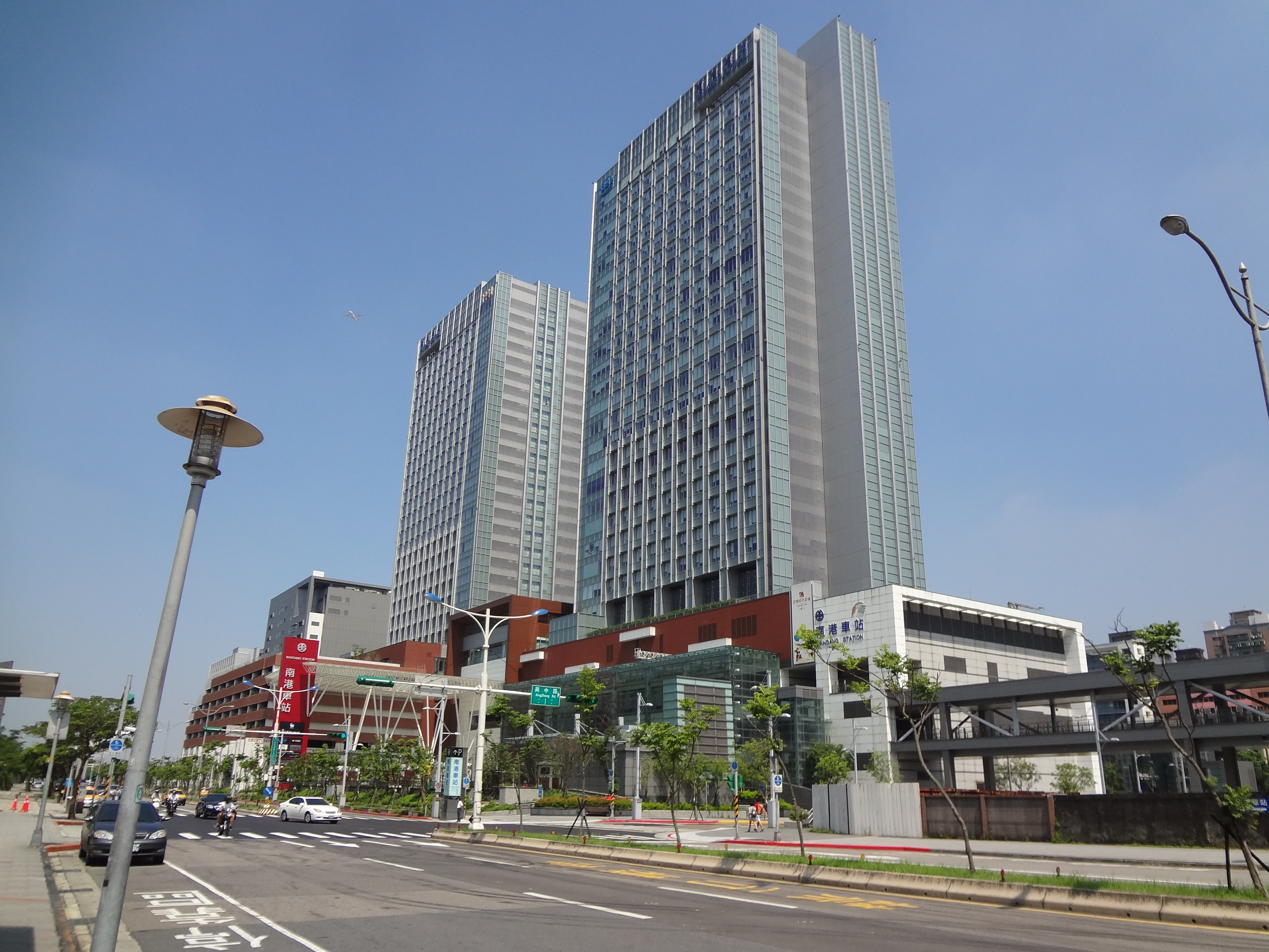 中文（台灣）: 南港車站大樓面向臺北市南港區忠孝東路七段的立面。